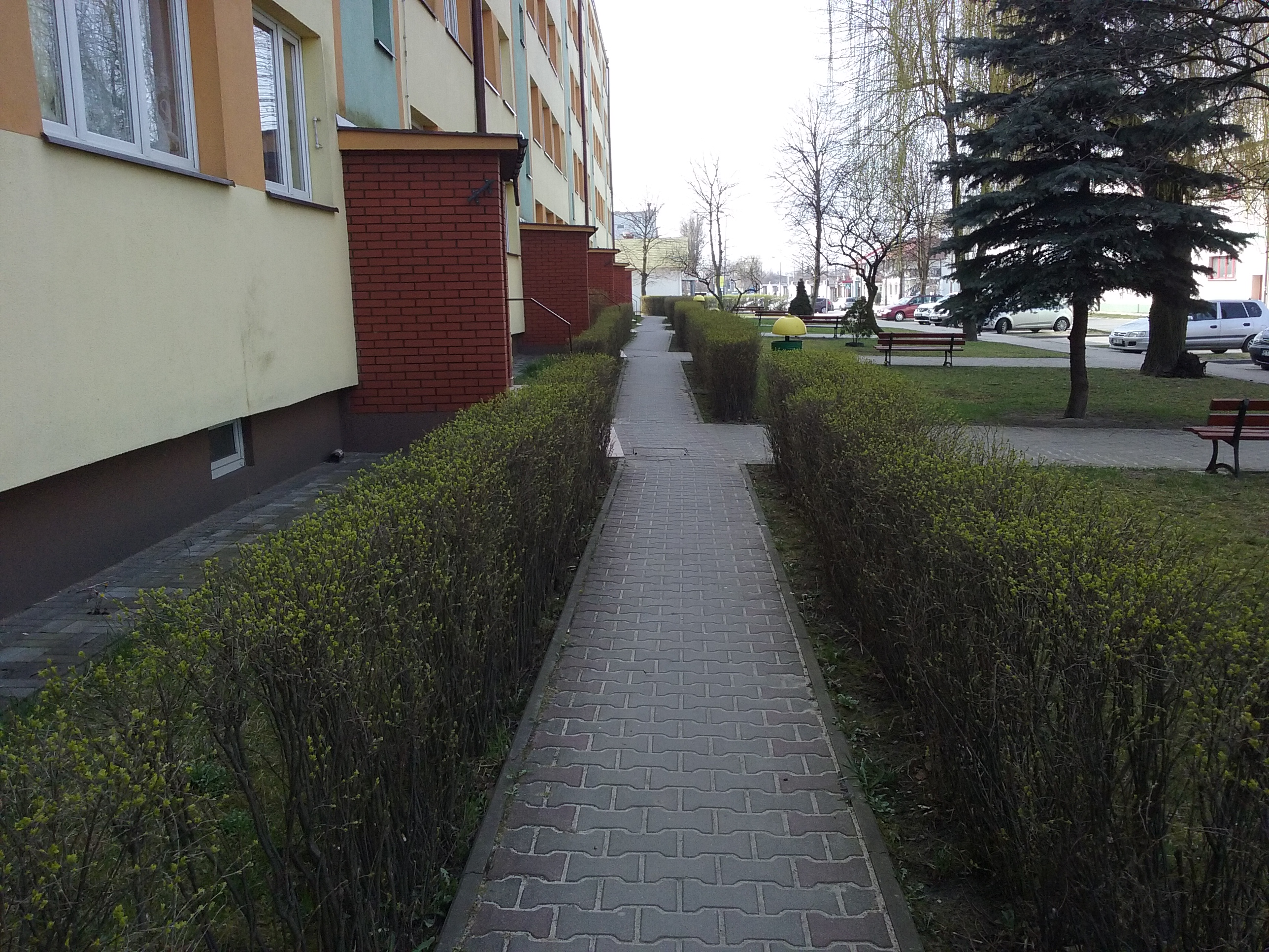 Tomaszów Mazowiecki w województwie łódzkim PL, EU. Jeden z bloków na największym tomaszowskim osiedlu - Niebrów. Ulica Dzieci Polskich. CC0